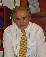 Eski Fenerbahçeli futbolcu ve yönetici Serkan Acar